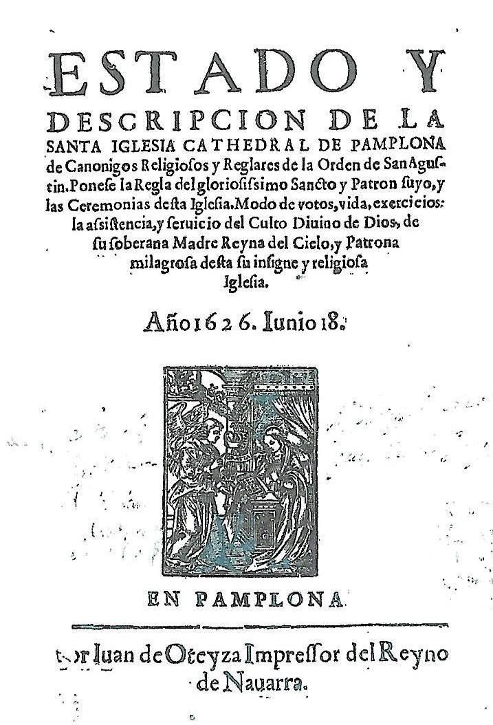 Estado y descripción de la catedral de Pamplona, impreso por Juan de Oteiza en Pamplona en 1626